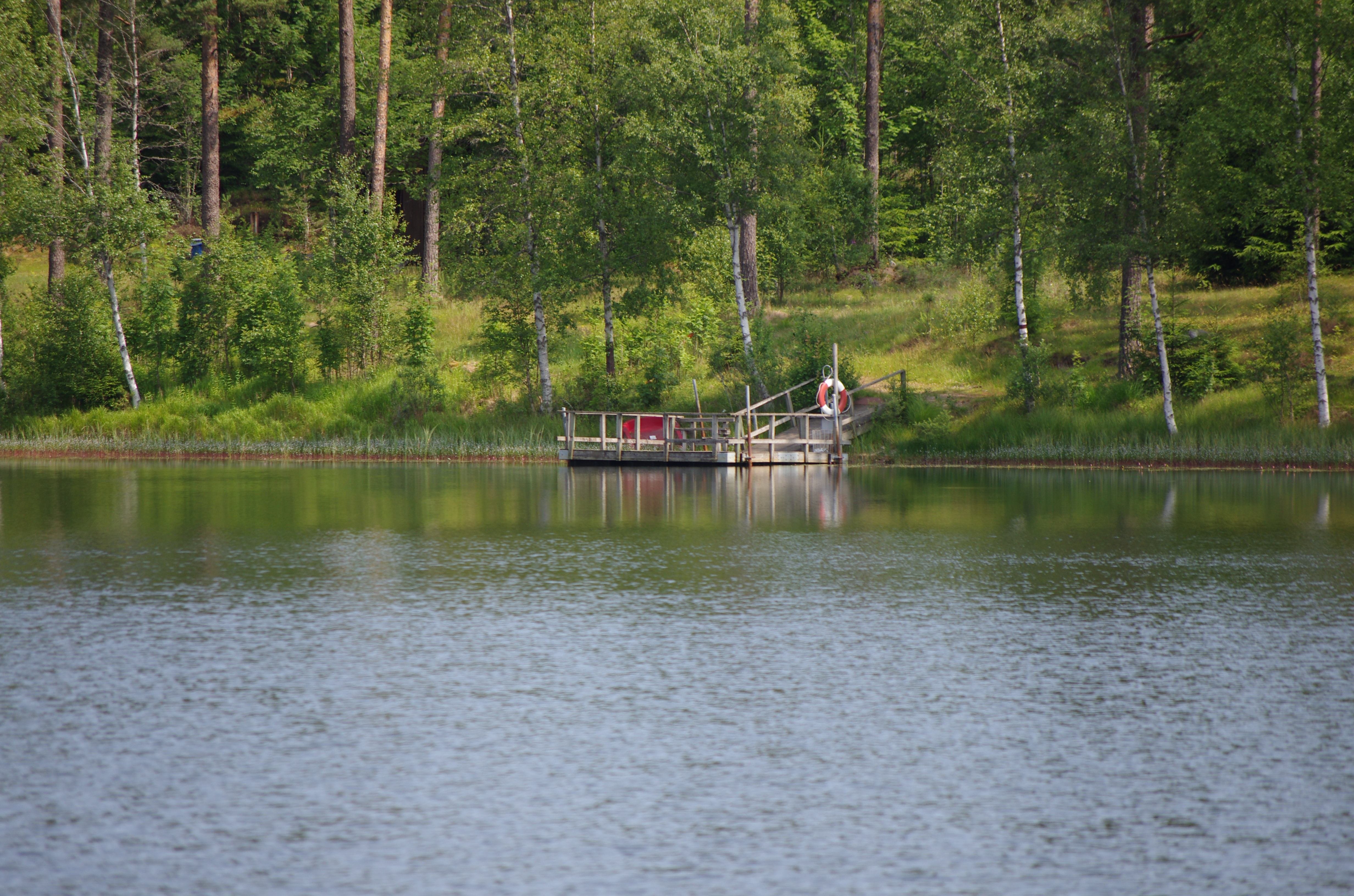 Vattlasjö i Jönköpings kommun Sverige.